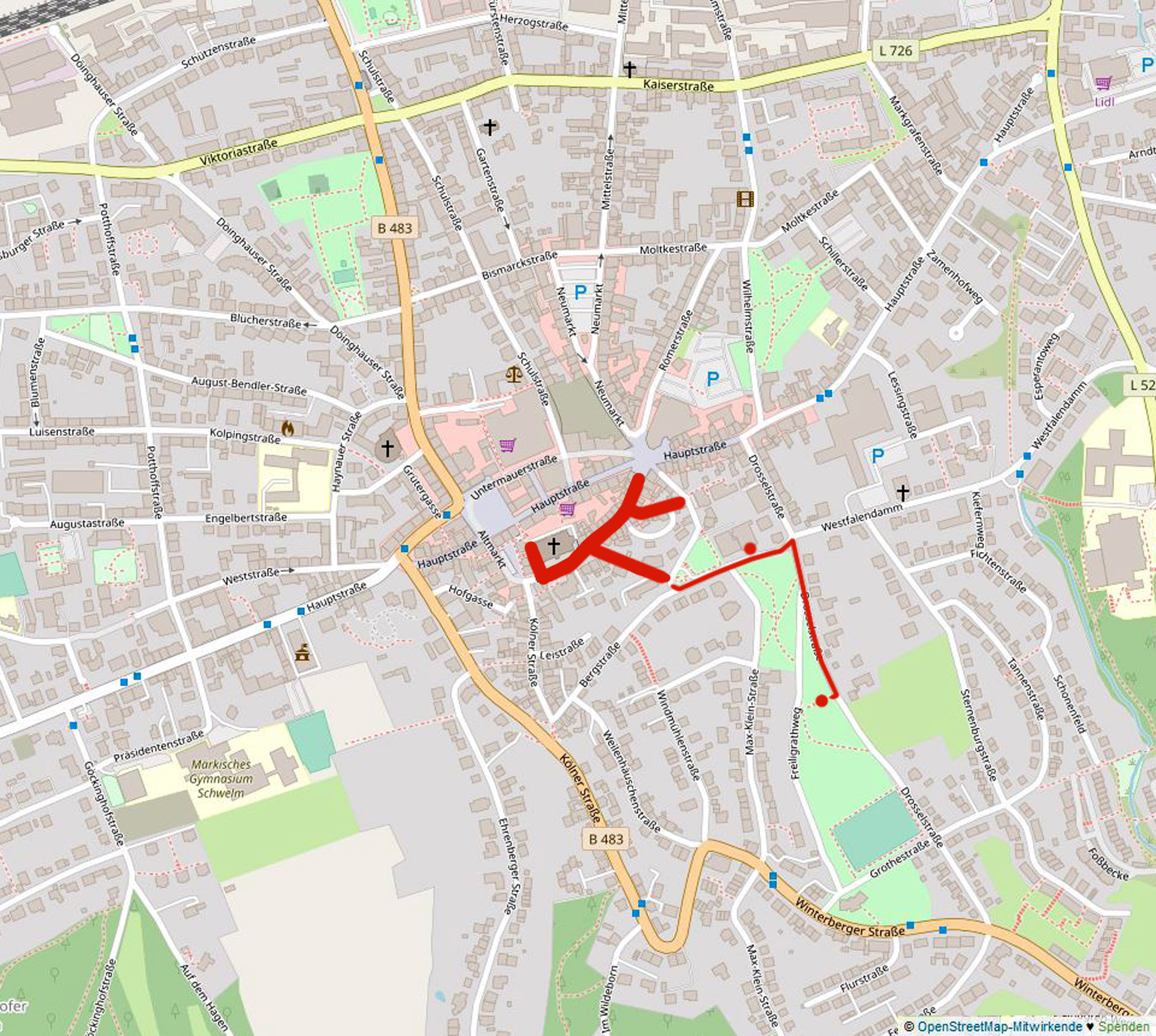 Lage von Bau- und Bodendenkmälern in Schwelm, rot markiert der Bereich Christuskirche, Kirchplatz, Kirchstraße, Herbergstraße, Südstraße, Westfalendamm (Nr. 15), Drosselstraße (Ehrenmal). Kartenvorlage aus OpenStreetMap wurde um Markierung (rot) ergänzt.